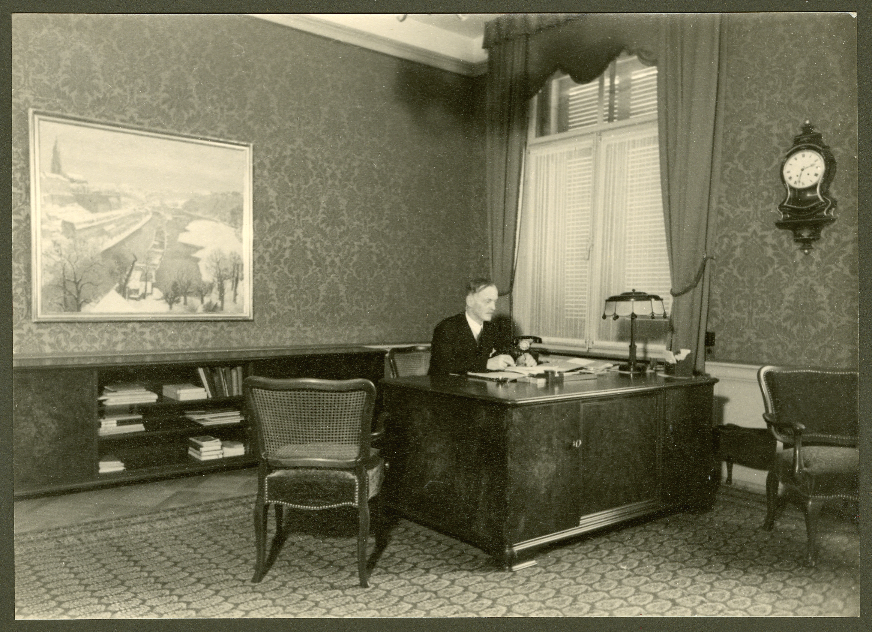 Die Mobiliar Direktor Dr. Hans Pfister in den 1930er Jahre an der Schwanengasse 14 in Bern